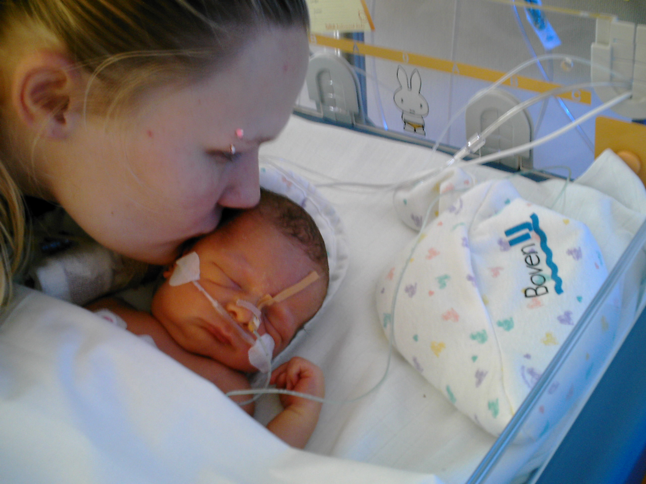 hier is de moeder samen met haar zoon